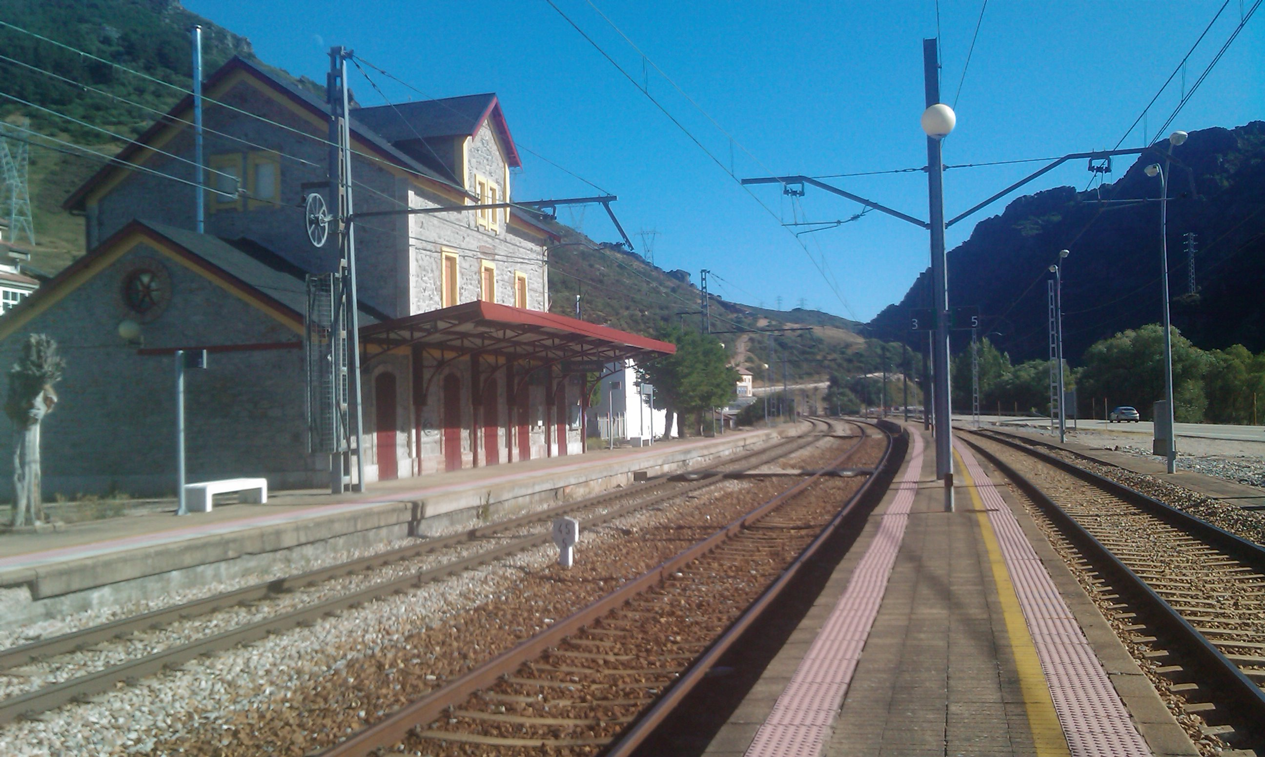 Andén central de la estación de Villamanín (provincia de León).